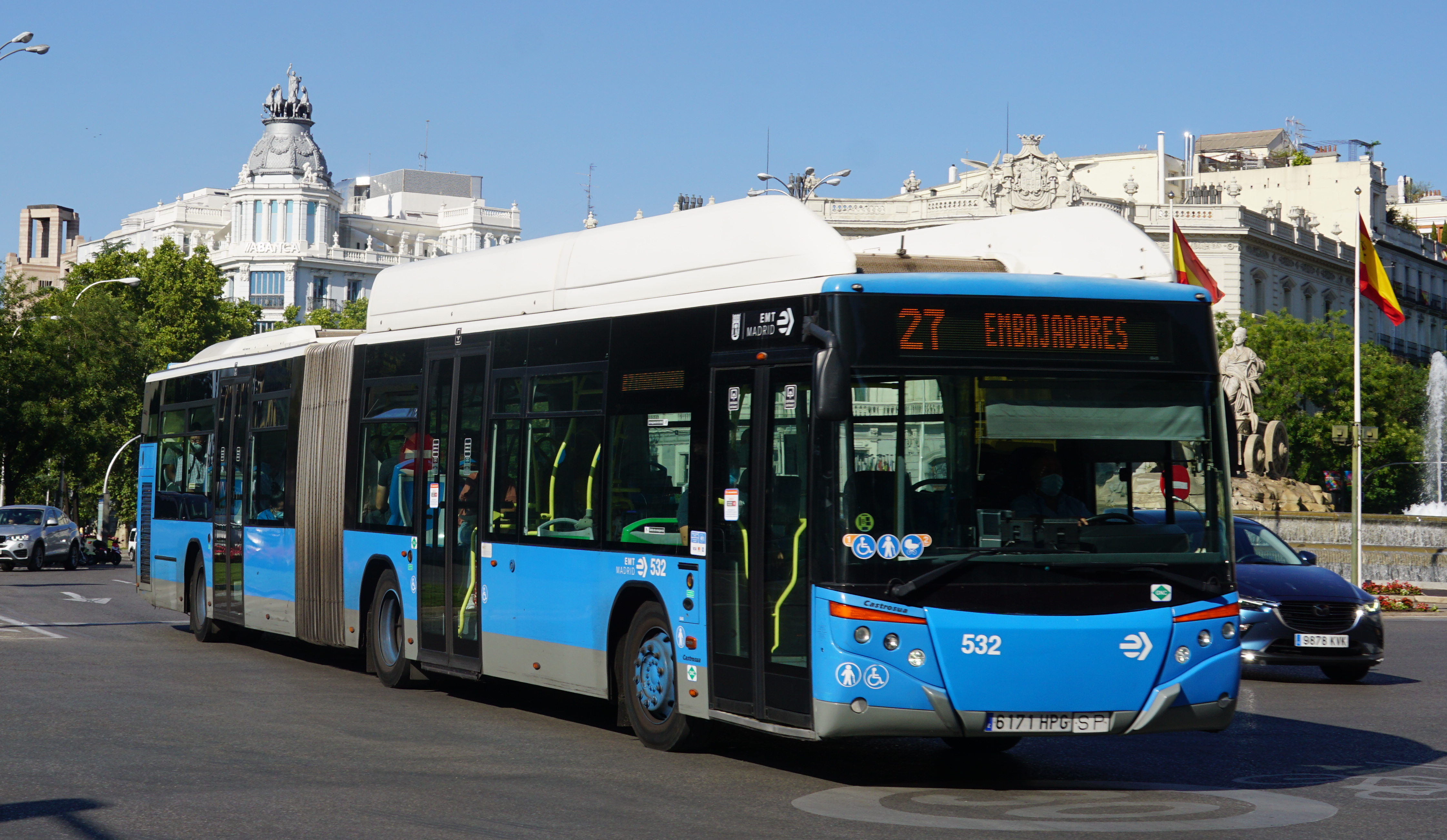 27 EMT Madrid en la Plaza de Cibeles, agosto 2020